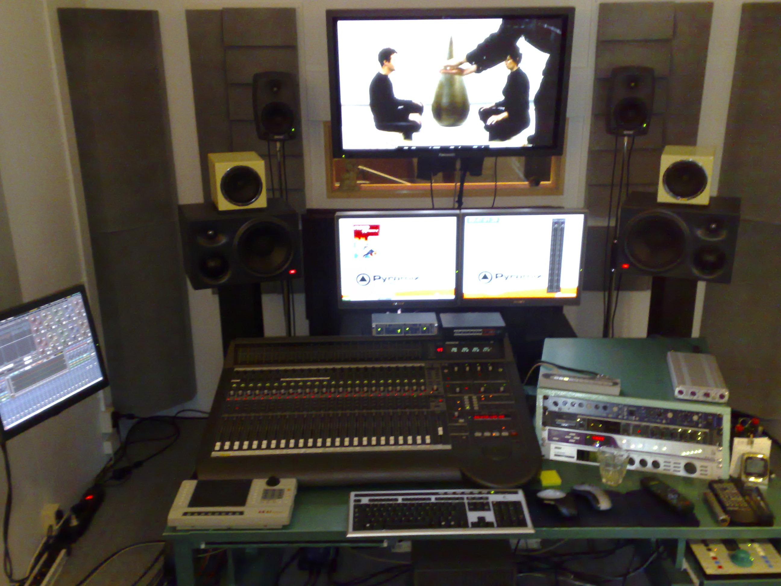 Audio-Visual Studio